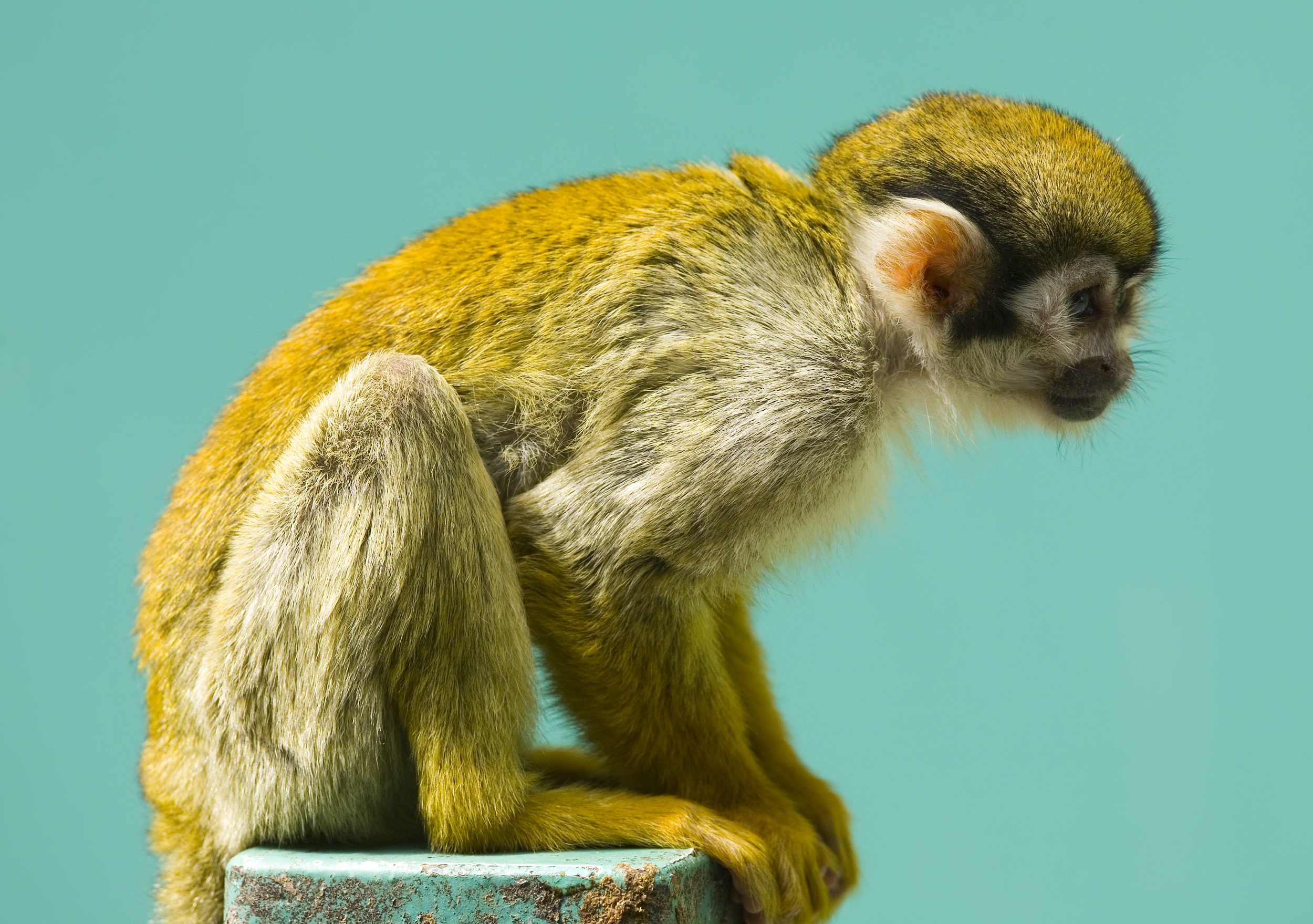 A Squirrel Monkey at Fuji Safari park Japan